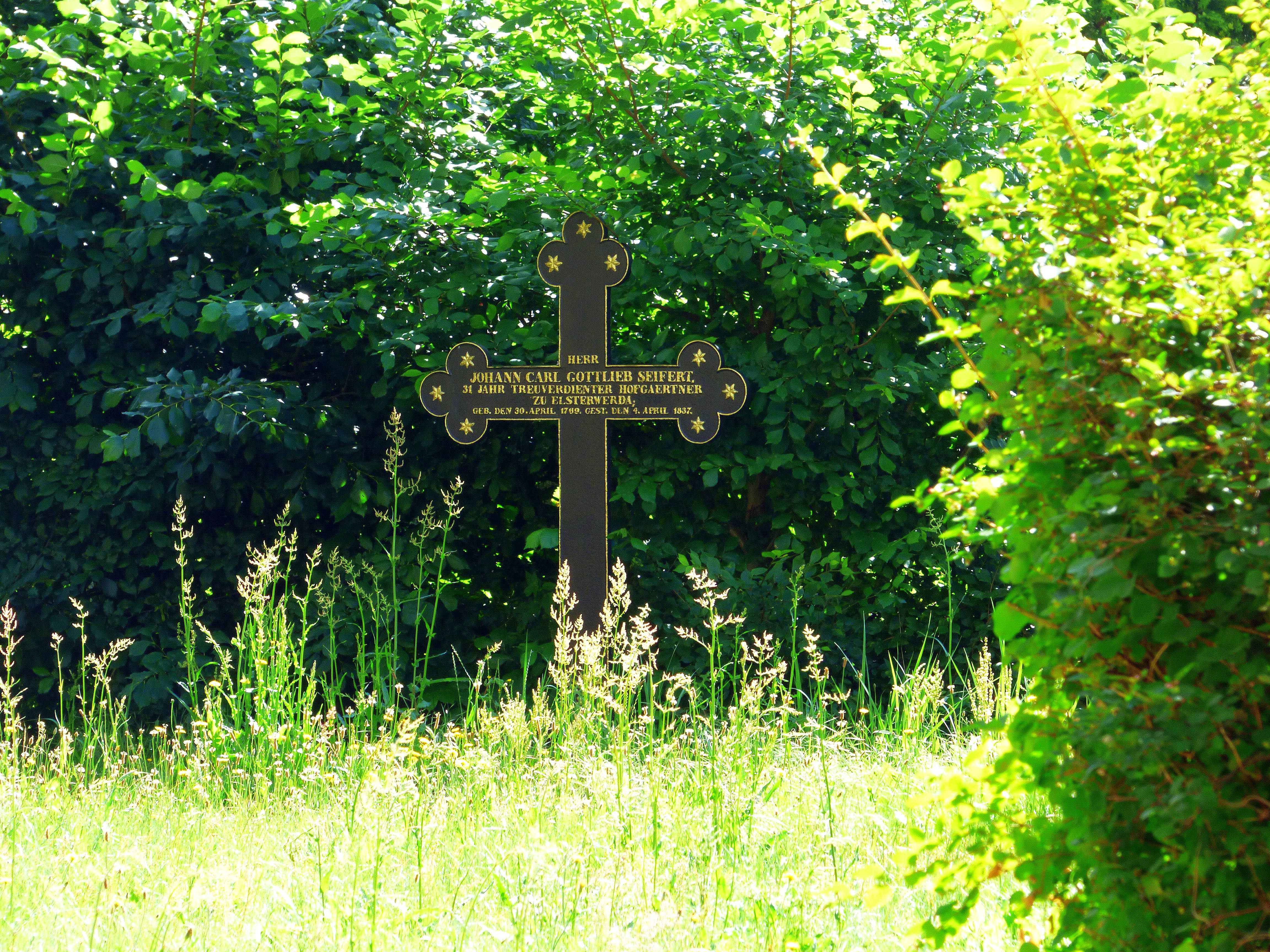 Das Grabkreuz des Johann Carl Gottlieb Seifert in Elsterwerda.